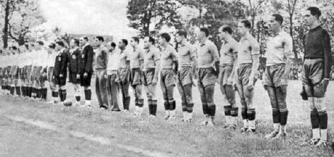 Présentation des équipes lors de Brésil - Pologne, match de la Coupe du monde 1938.